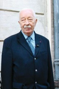 Príncipe Felipe de Araucanía y Patagonia. Philippe Boiry